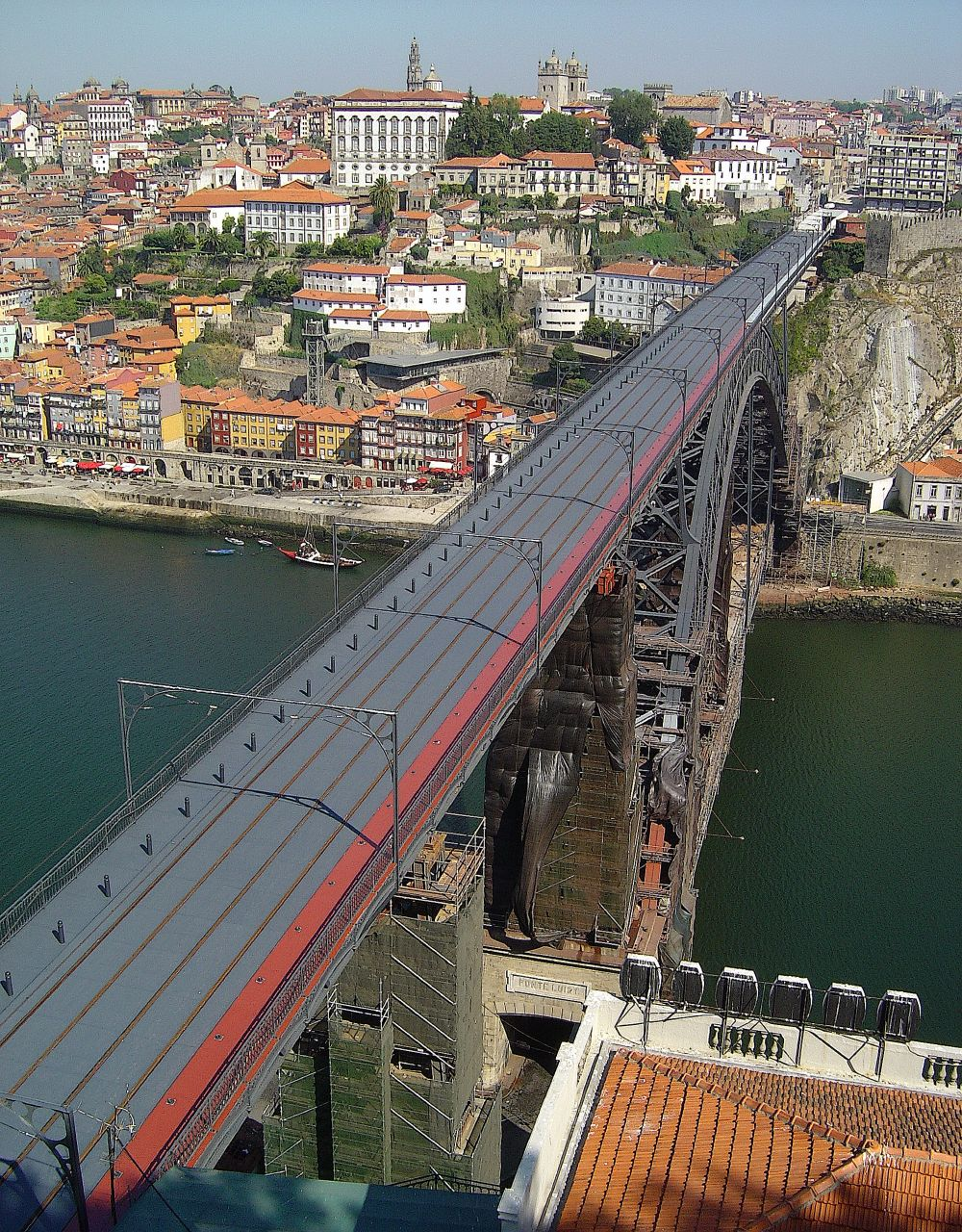 Ponte D. Luis